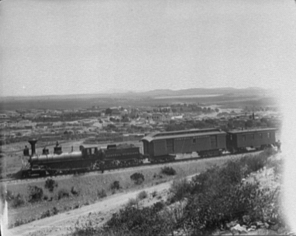 Entrada del ferrocaril a Guadalupe